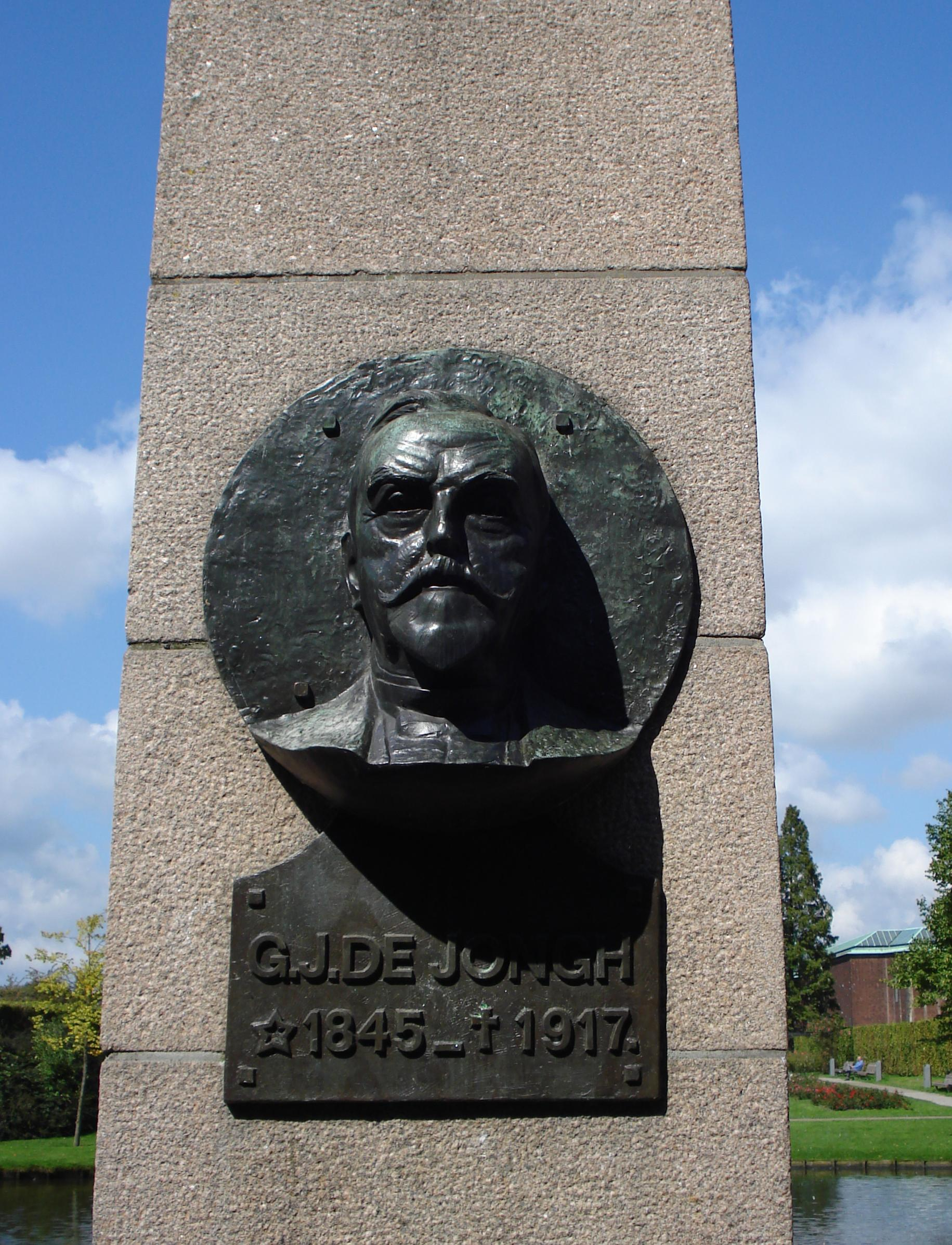 Rotterdam, Museumpark. Monument G.J. de Jongh. Plaquette door Leendert Bolle. Rotterdam/The Netherlands. Leendert Bolle (1879–1942) DescriptionDutch sculptor and painterDate of birth/death 11 April 1879 13 December 1942Location of birth/death Rotterdam RhedenAuthority control : Q2029568 BPN: 67192930 RKD: 10142 creator QS:P170,Q2029568